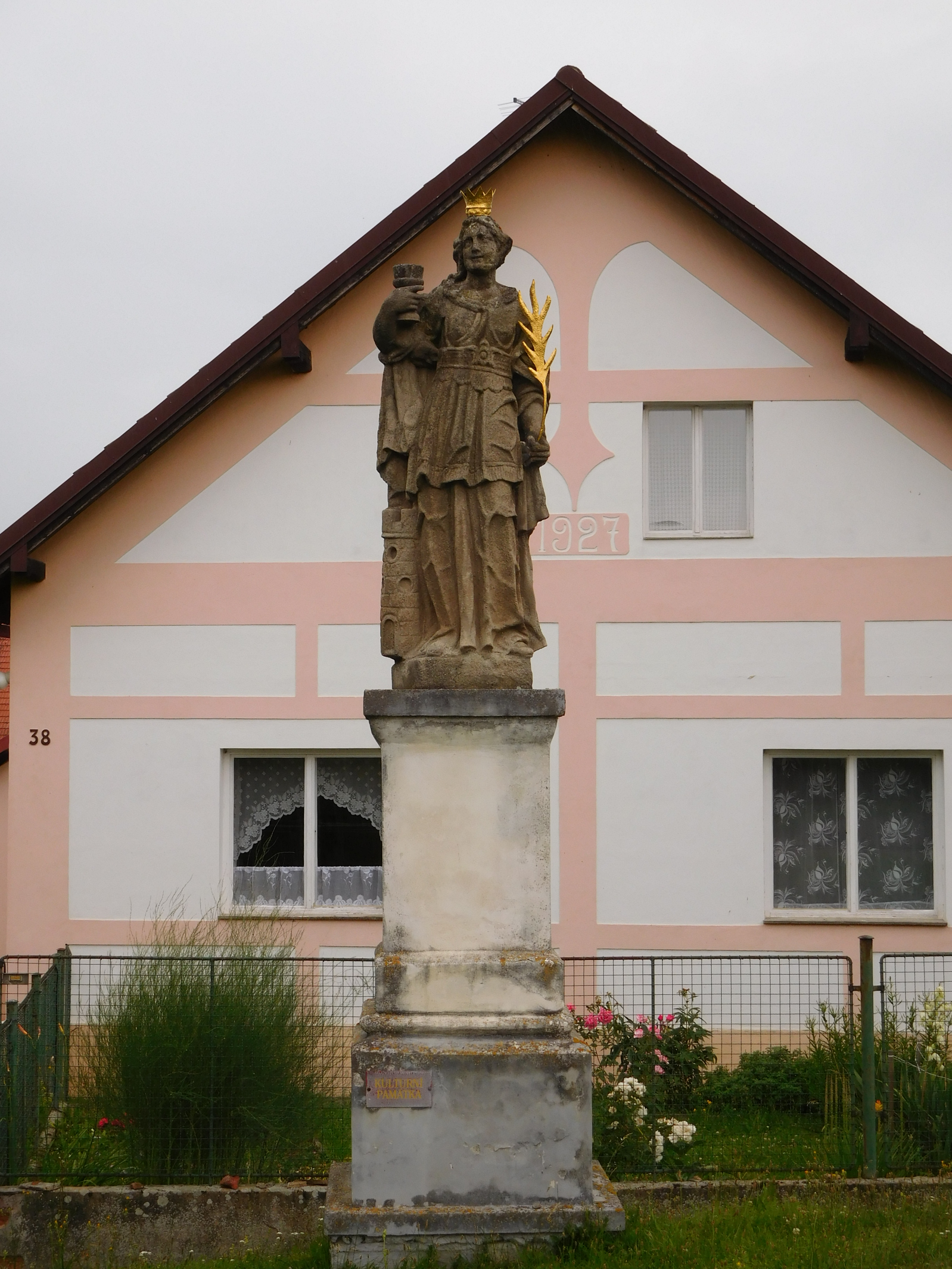 Lipno - socha sv. Barbory před čp. 38